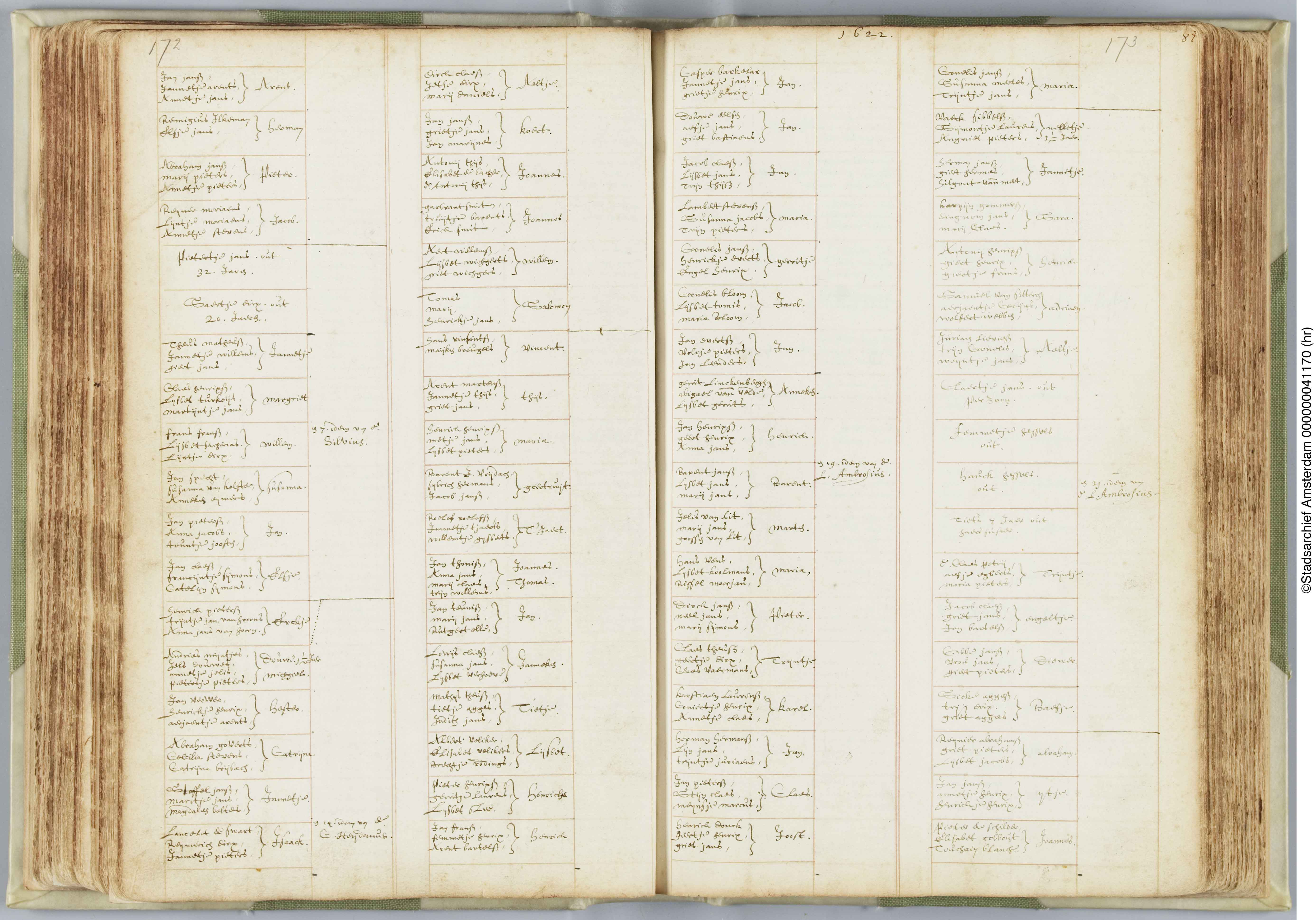 Doopregister Nieuwe Kerk Amsterdam 1622. Johannes Thysius: 14 juni 1622 (p. 172, 2e kolom, 3e van boven)